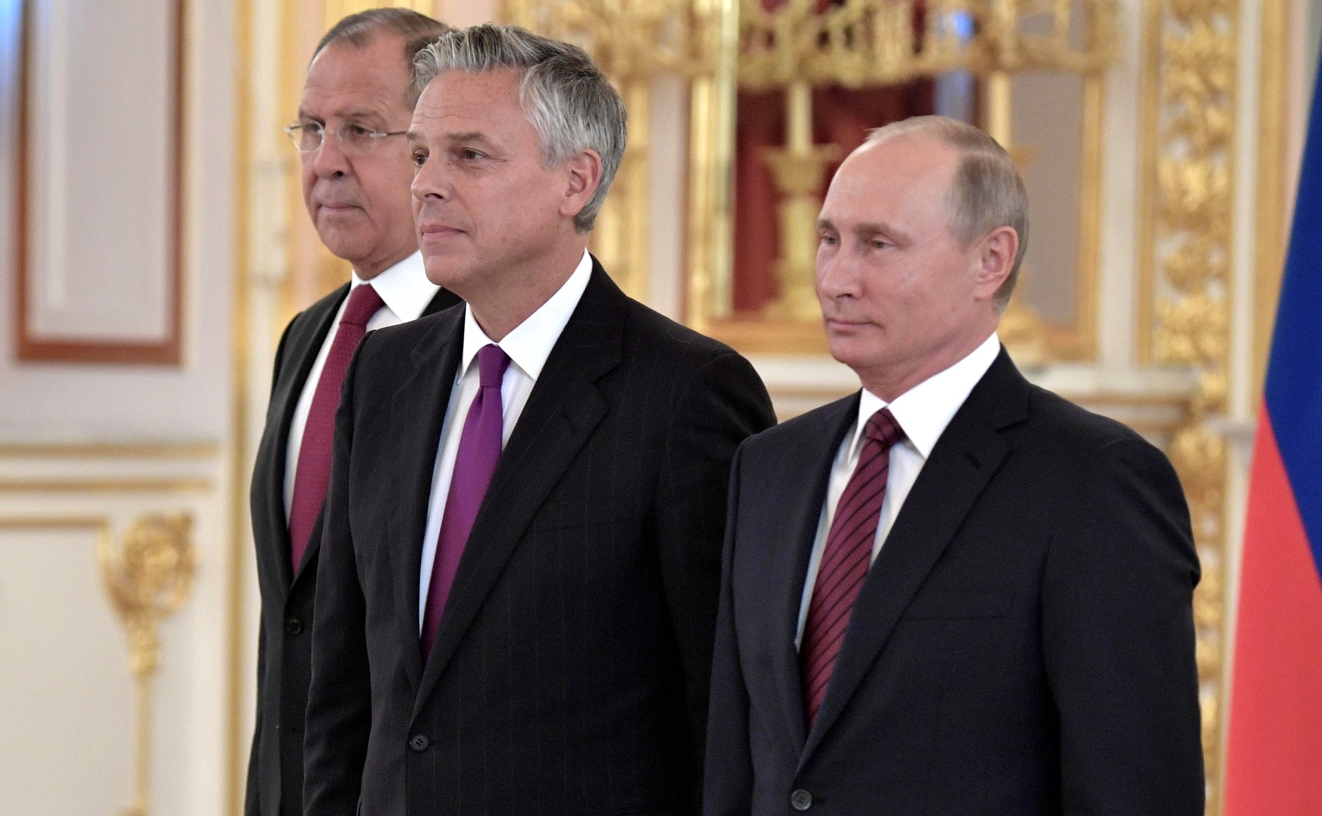 Церемония вручения верительных грамот послами иностранных государств. Верительную грамоту Президенту России вручает посол США Джон Мид Хантсман.